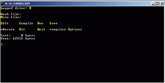 Erste Version der Programmiersprache Turbo Pascal von Borland